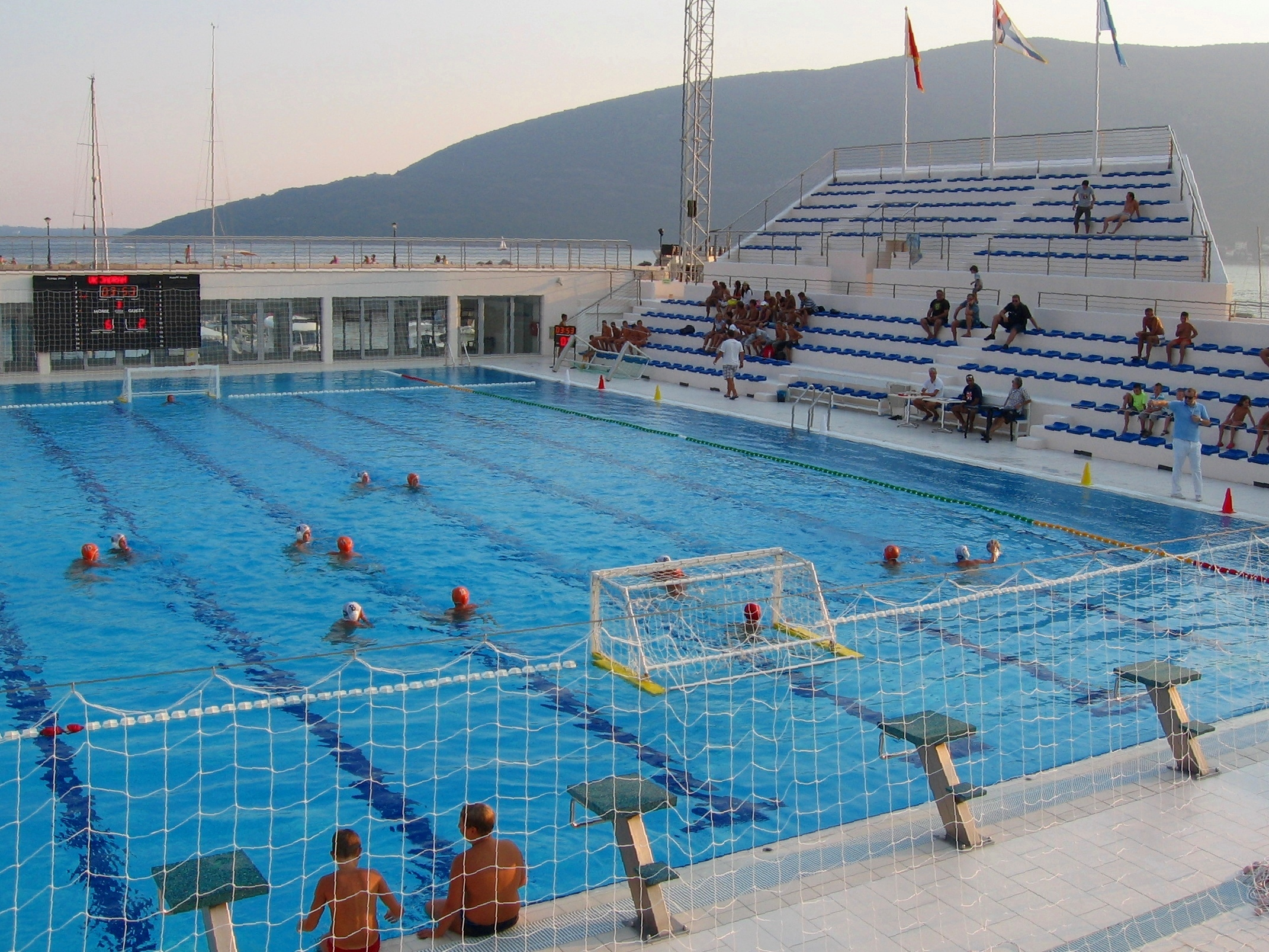 Херцег-Нови. Открытый бассейн.